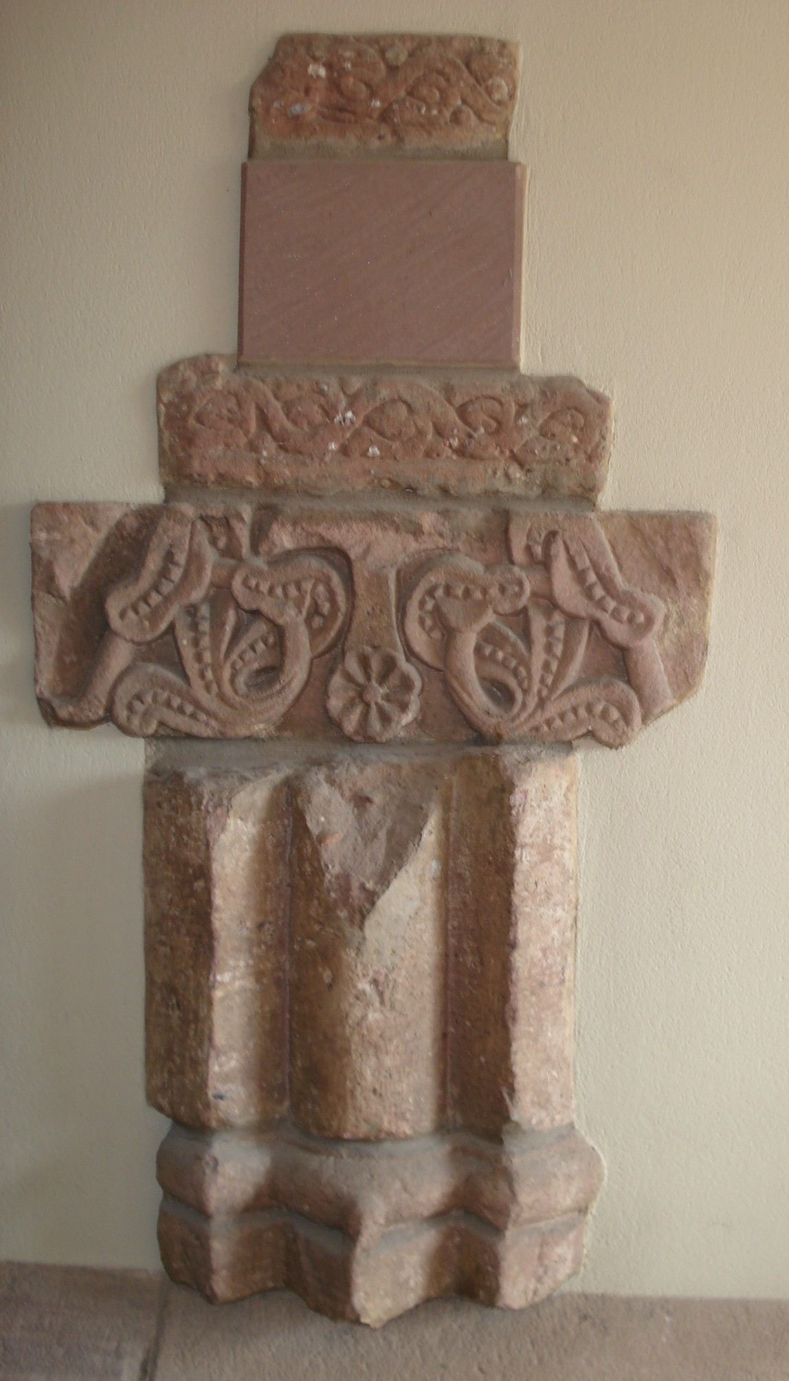 Thierenbach : Eléments architecturaux provenant de l'église romane du 12e siècle encastrés dans le mur près de l'entrée latérale.